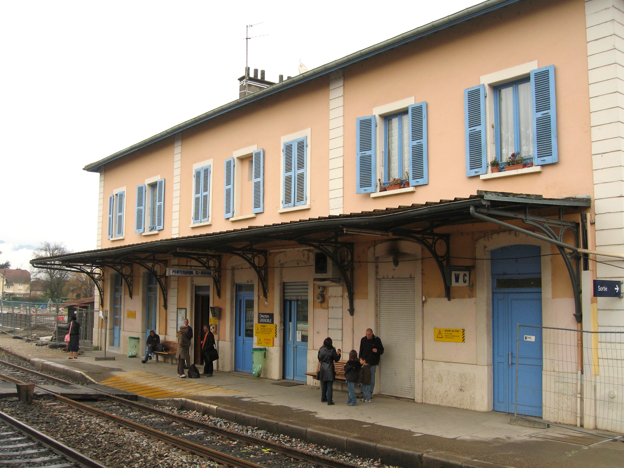 Bâtiment voyageurs de la gare de Pontcharra-sur-Breda.